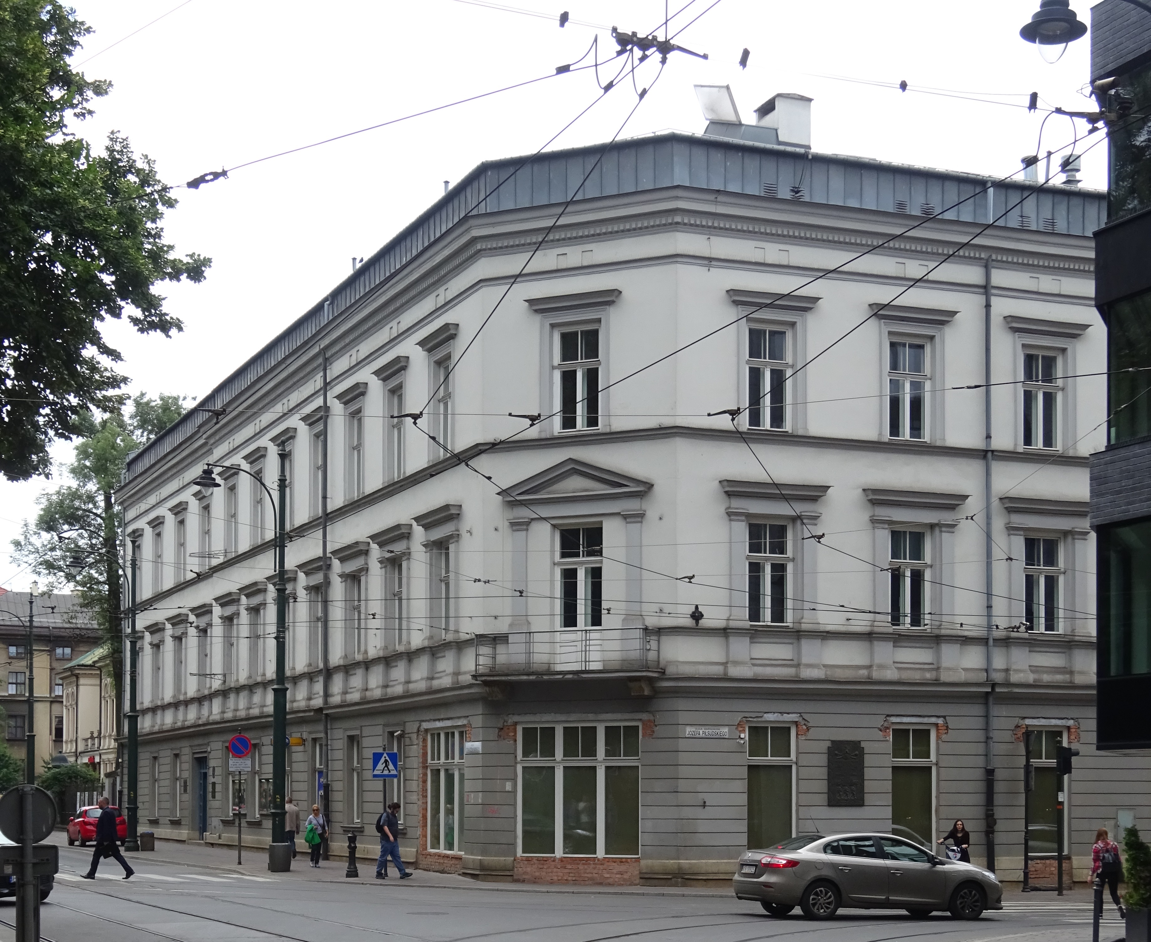 Akademia Sztuk Teatralnych im. Stanisława Wyspiańskiego w Krakowie (dawna PWST), gmach przy ulicy Floriana Straszewskiego 22.